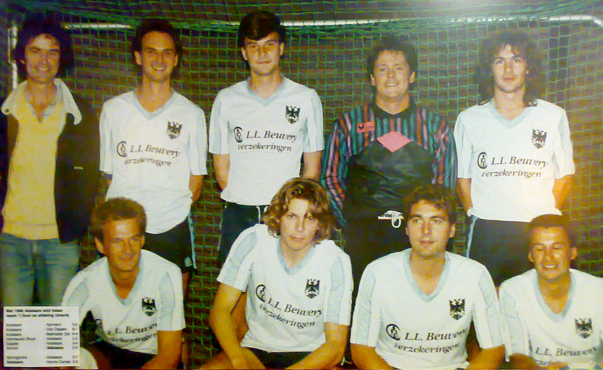 ZVV Adelaars in 1990 met tweede van linksonder Youri Mulder